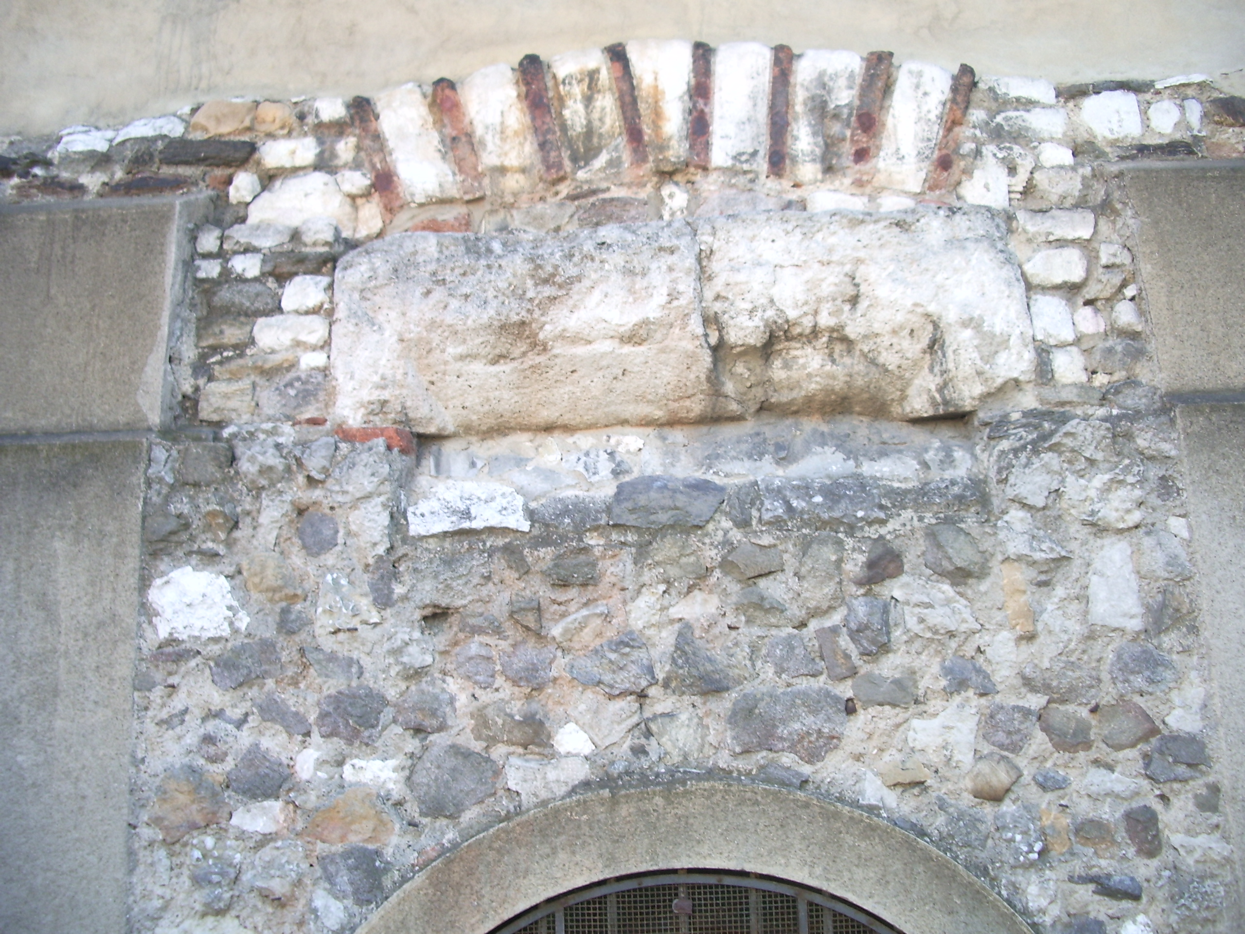 Voute, vestige de l'église saint-Irénée originelle (5ieme siècle)